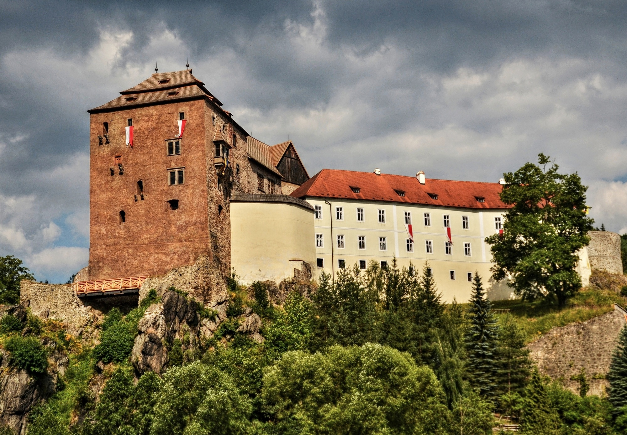 Hrad a zámek Bečov nad Teplou, Bečov nad Teplou 9, Bečov nad Teplou.